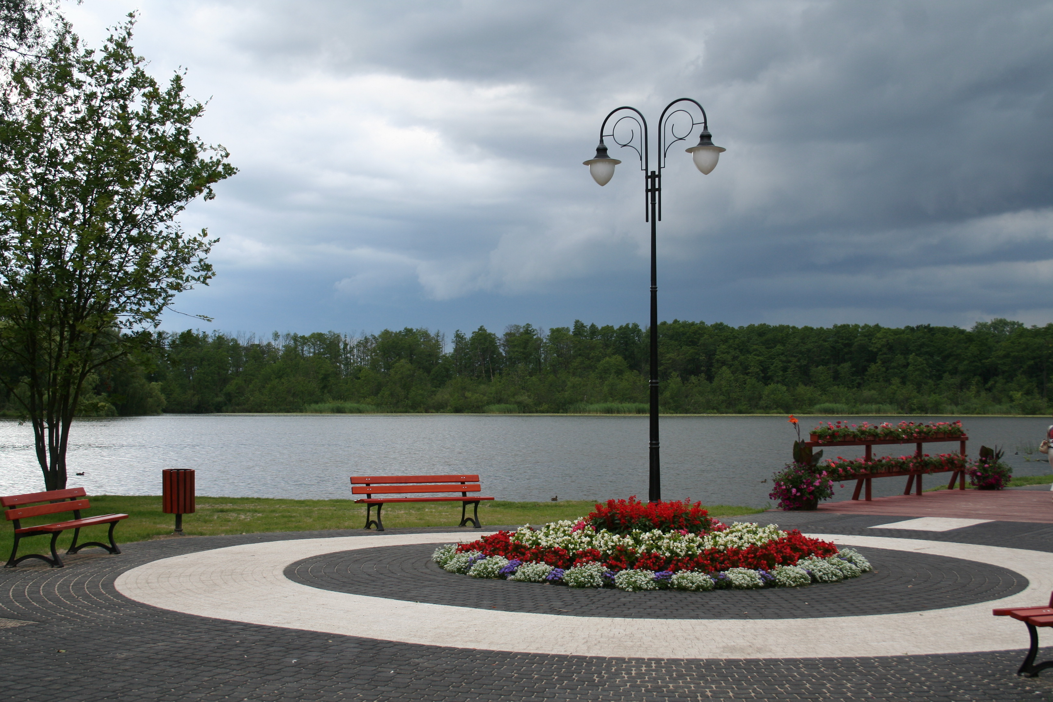 Le lac Wolsztyńskie